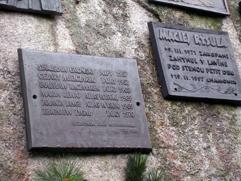 Symbolický cintorín pri Popradskom plese, Vysoké Tatry